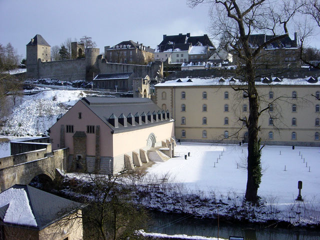 Tutesall am Gronn, dee bis 1984 als Atelier vum Prisong gebraucht ginn ass an hautdesdaags fir Konschtaustellungen an aner kulturell Veranstaltungen dingt. Den Numm vum Sall ass dorop zeréckzeféieren, datt gesot ginn ass, datt d'Prisonnéier an dësem Atelier Tute gepecht hunn. Dohier och de lëtzebuerger Ausdrock "Tute peche" fir "am Prisong sëtzen".